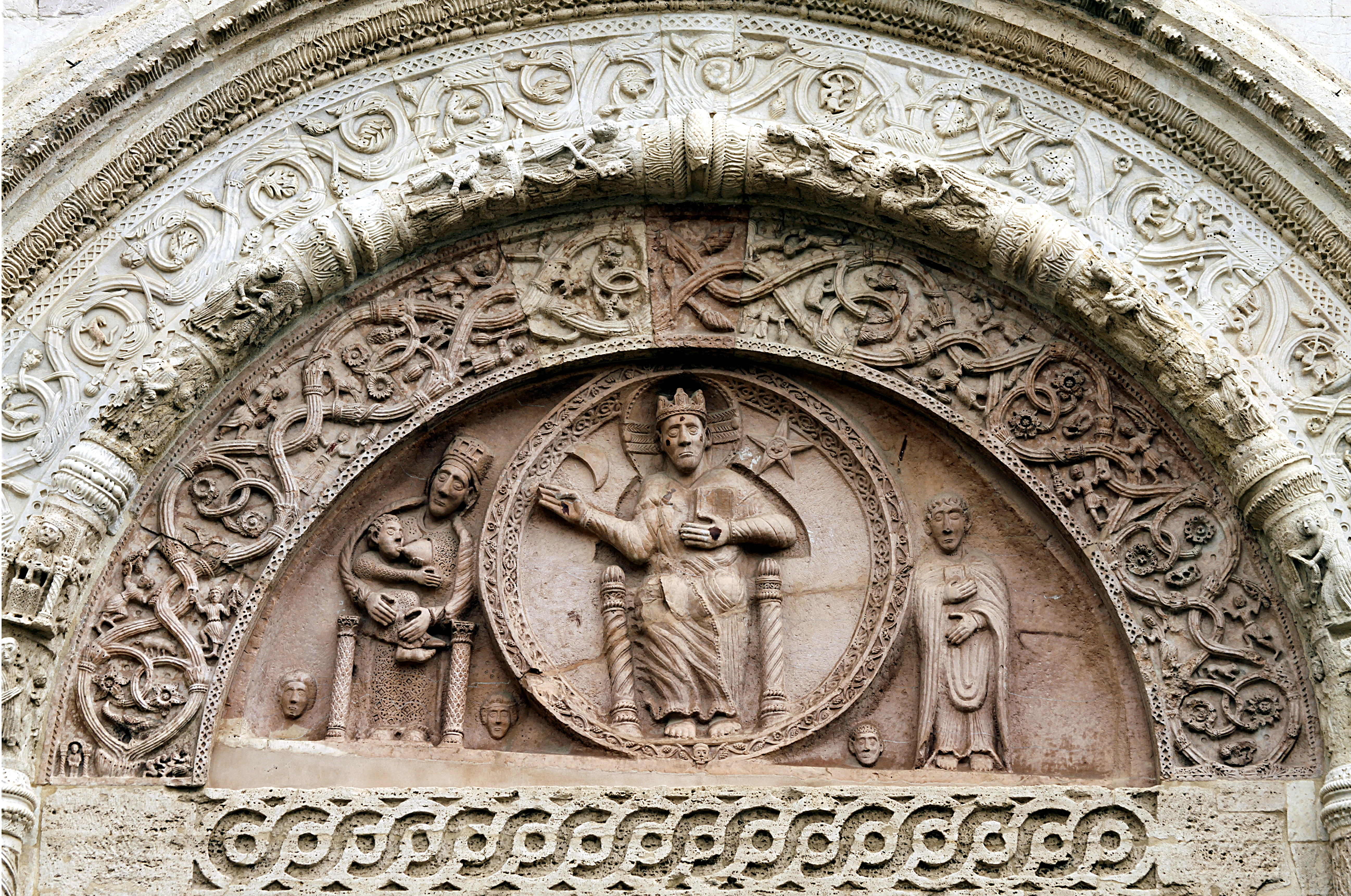 San Rufino - Assisi